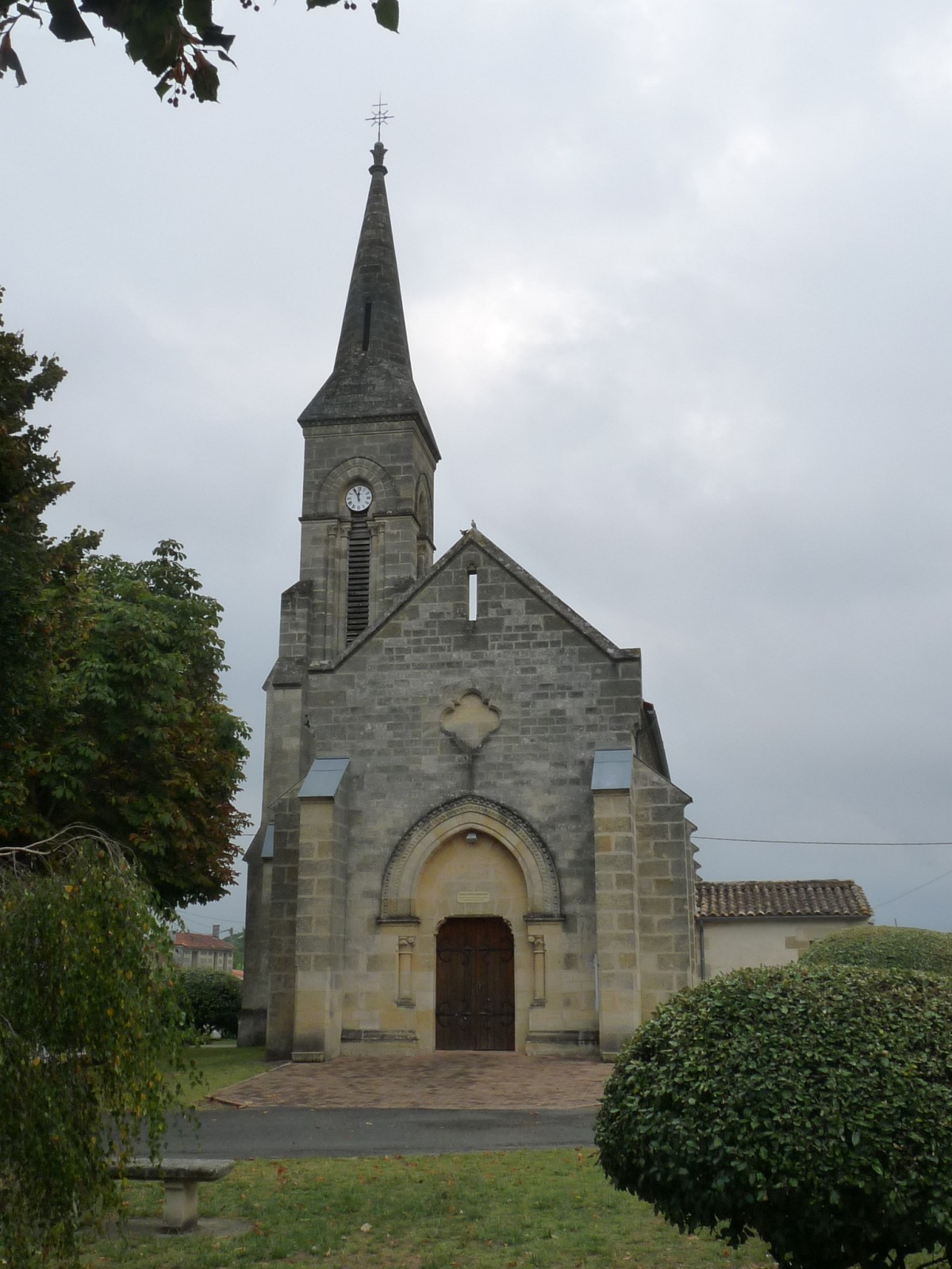 Eglise de Saugon,Gironde, France